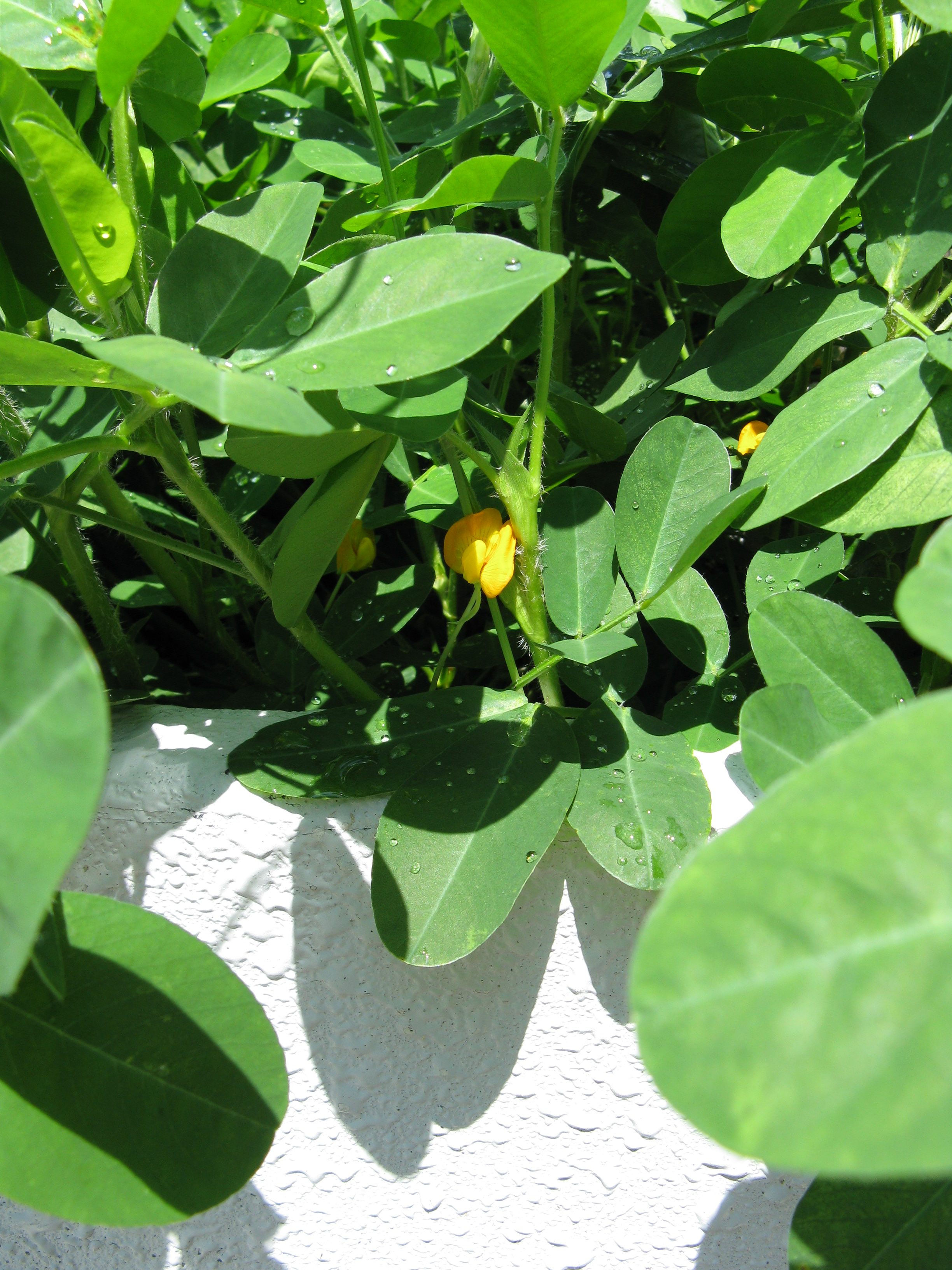 Arachis hypogaea